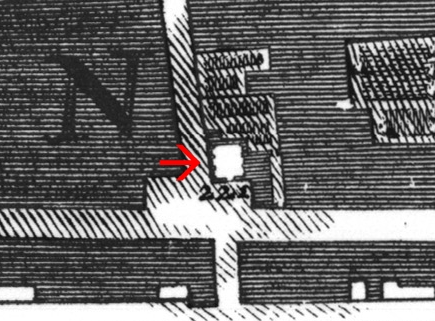 Pianta di Nolli